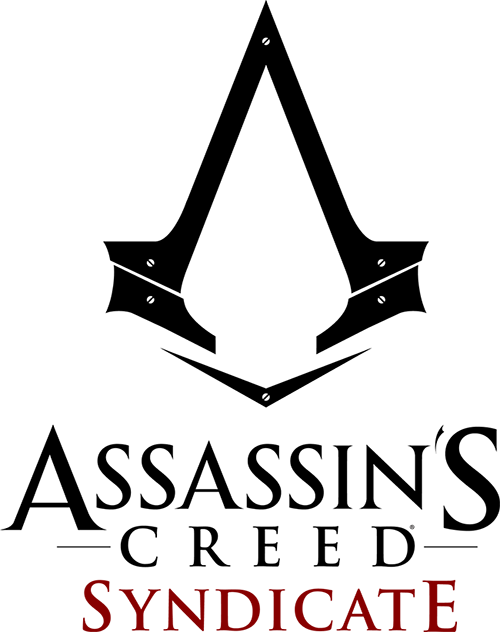 assassins-creed-syndicate-logo